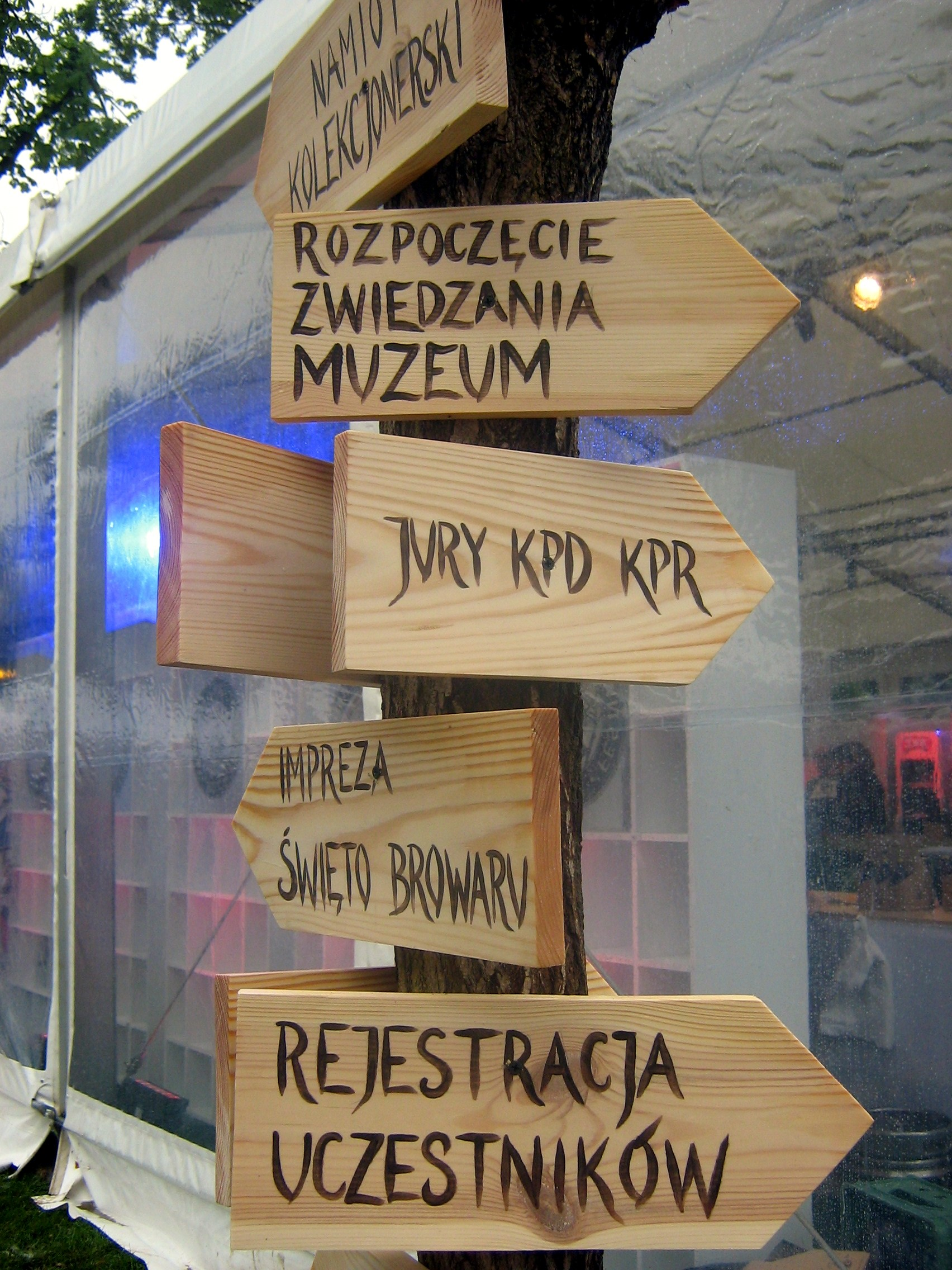 Drogowskaz na Festiwalu Birofilia